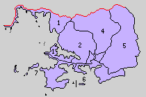 愛媛県南宇和郡の町村制時点の町村。